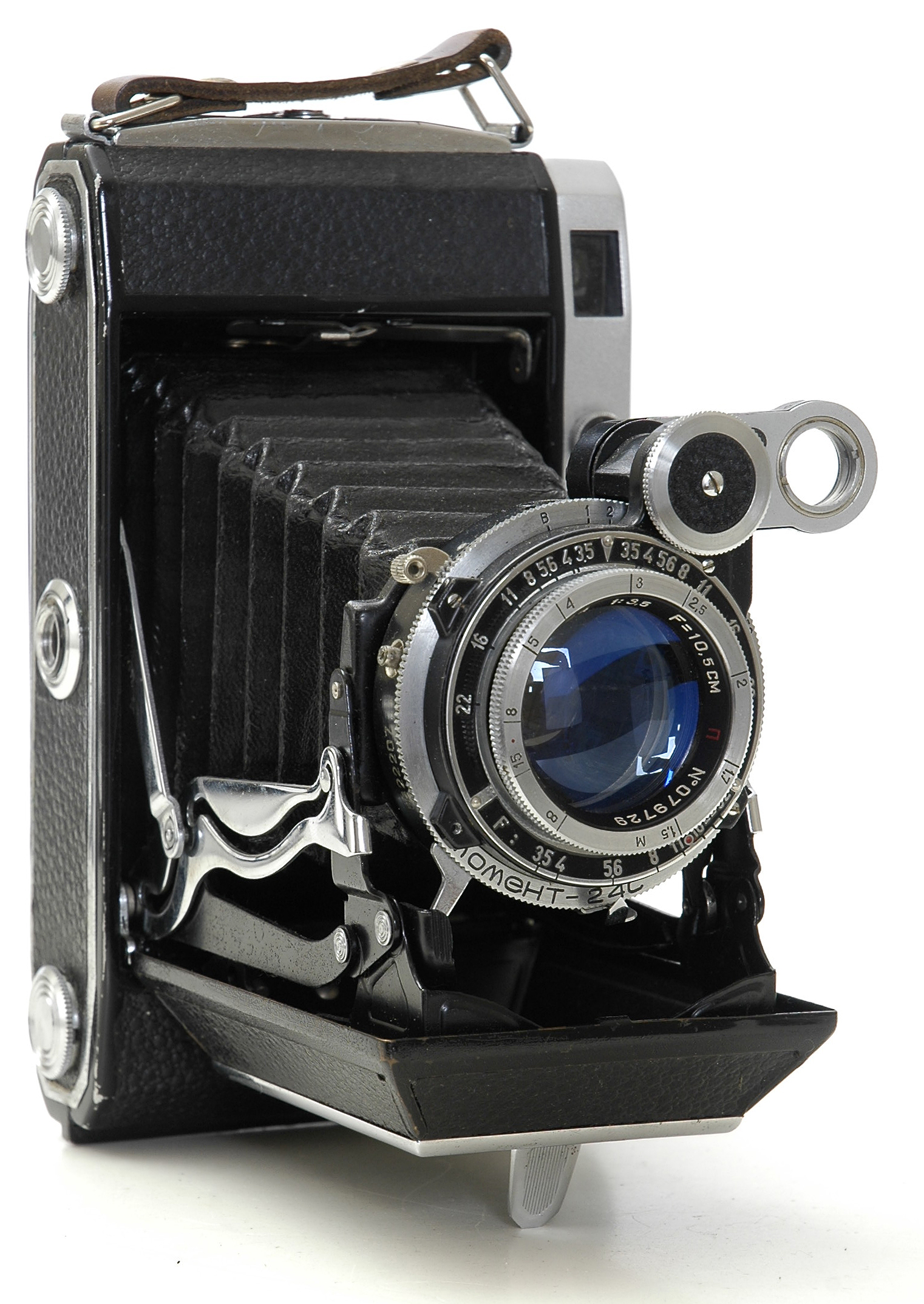 Фотоаппарат "Москва 5"